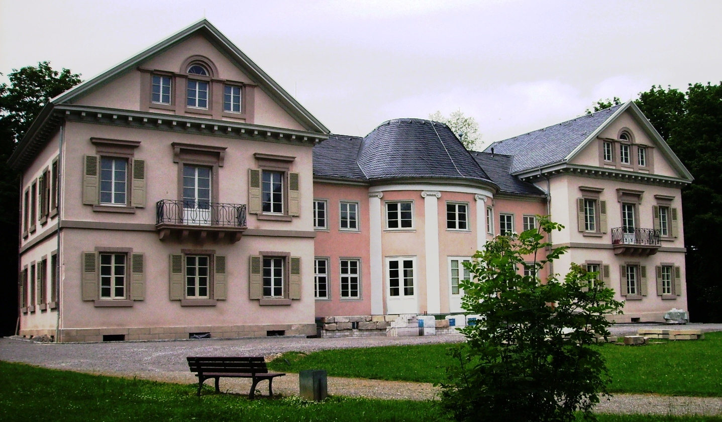 Hechingen, Germany